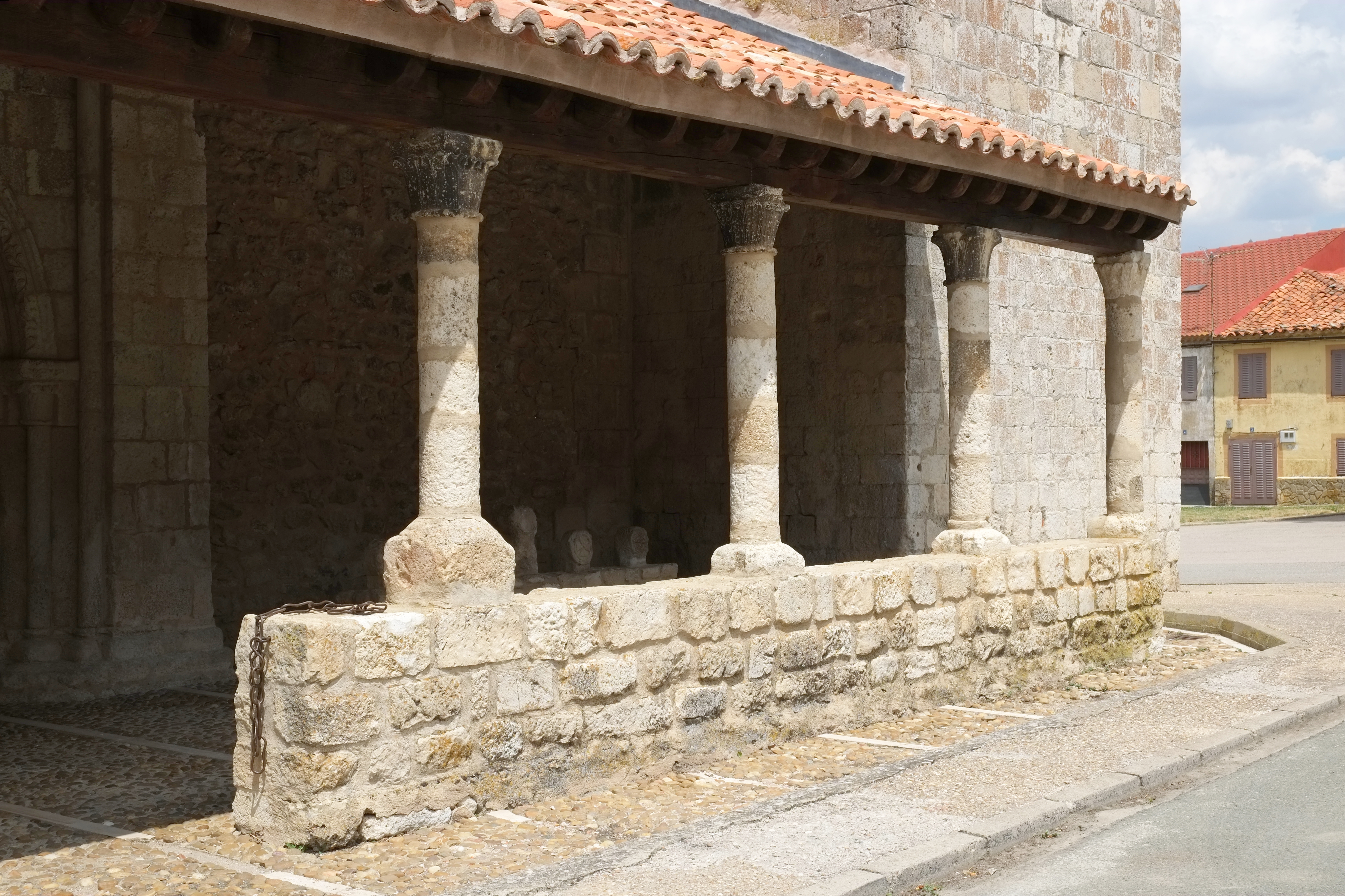 Kirche San Bartolomé in Campisábalos in der Provinz Guadalajara in Spanien